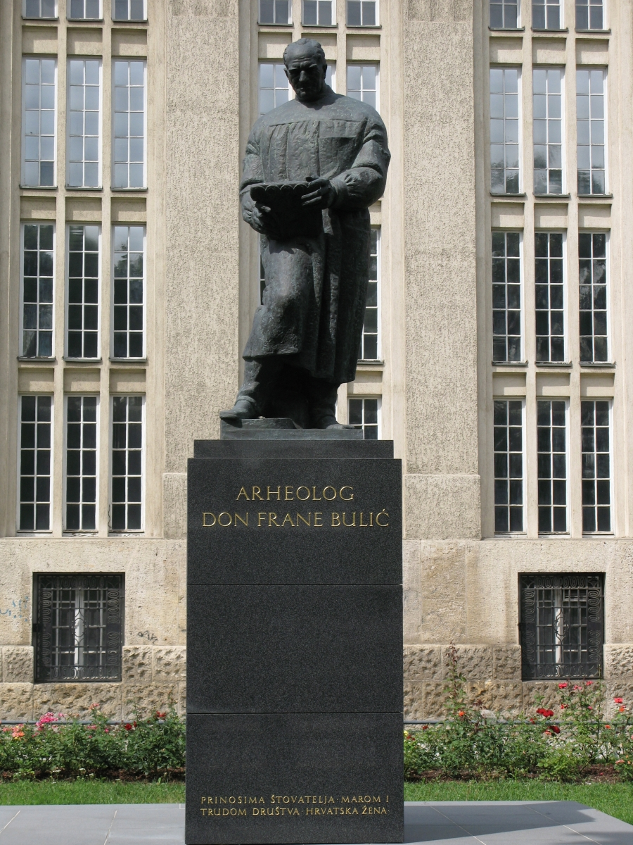 spomenik Don Frani Buliću Frana Kršinića iz 1935. godine na Trgu Marka Marulića u Zagrebu